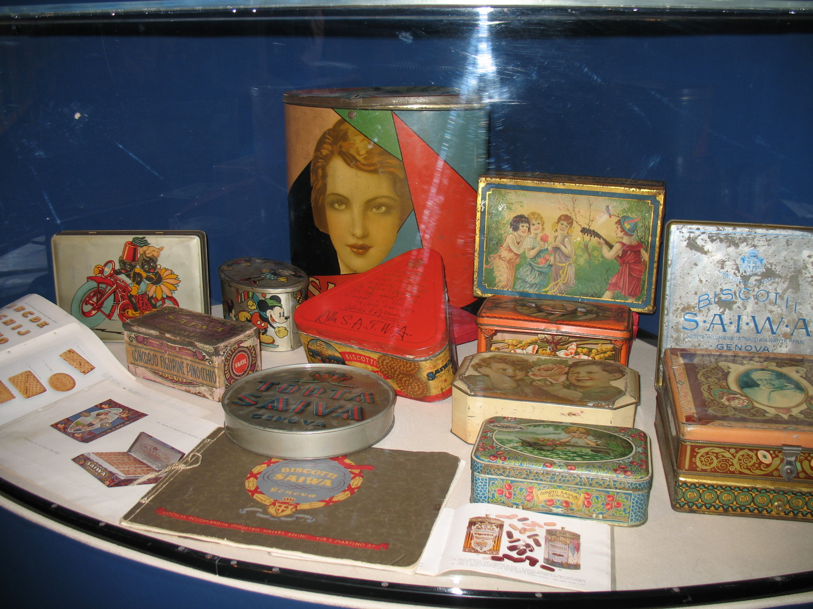 Esposizione di materiali e prodotti dolciari ad una mostra sull'industria di settore nel genovesato